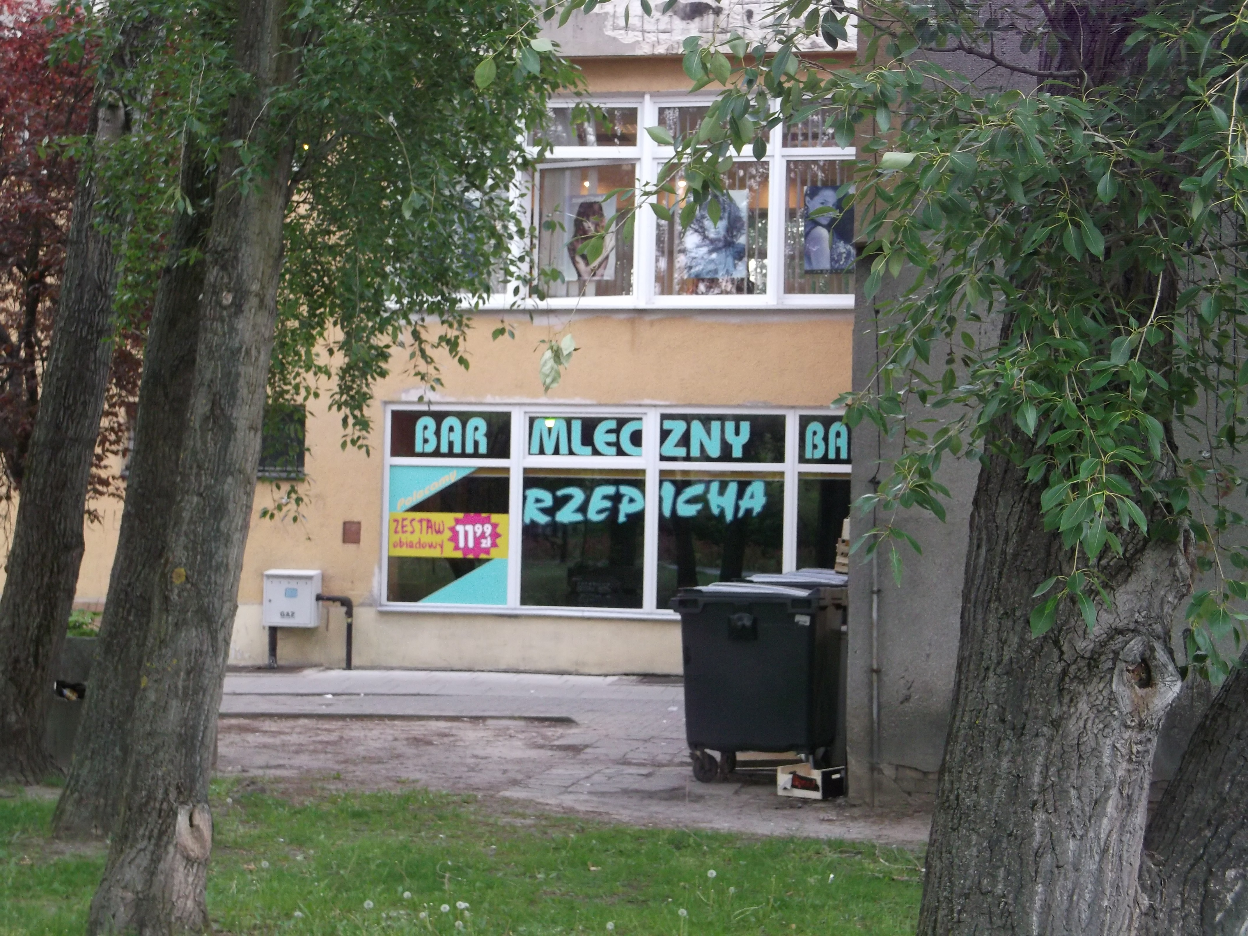 Osiedle Piastowskie w Poznaniu.